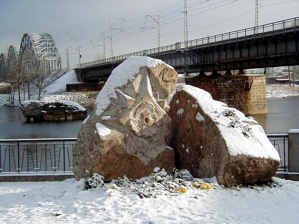 Rīga, Brīvības cīnītāju piemineklis 2002-11-12